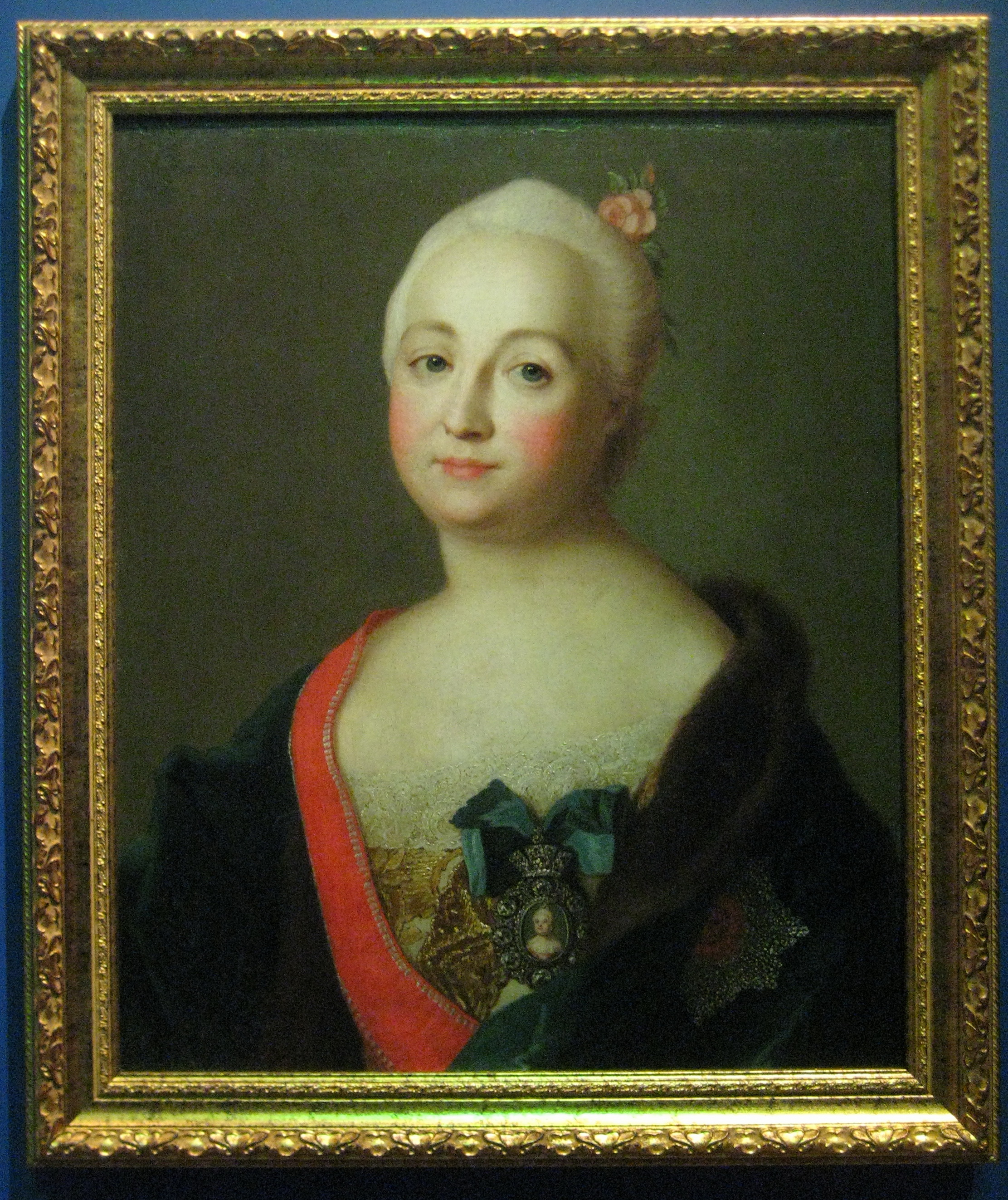 А.К. Воронцова. Неизвестный художник с оригинала Л. Токе. ГИМ